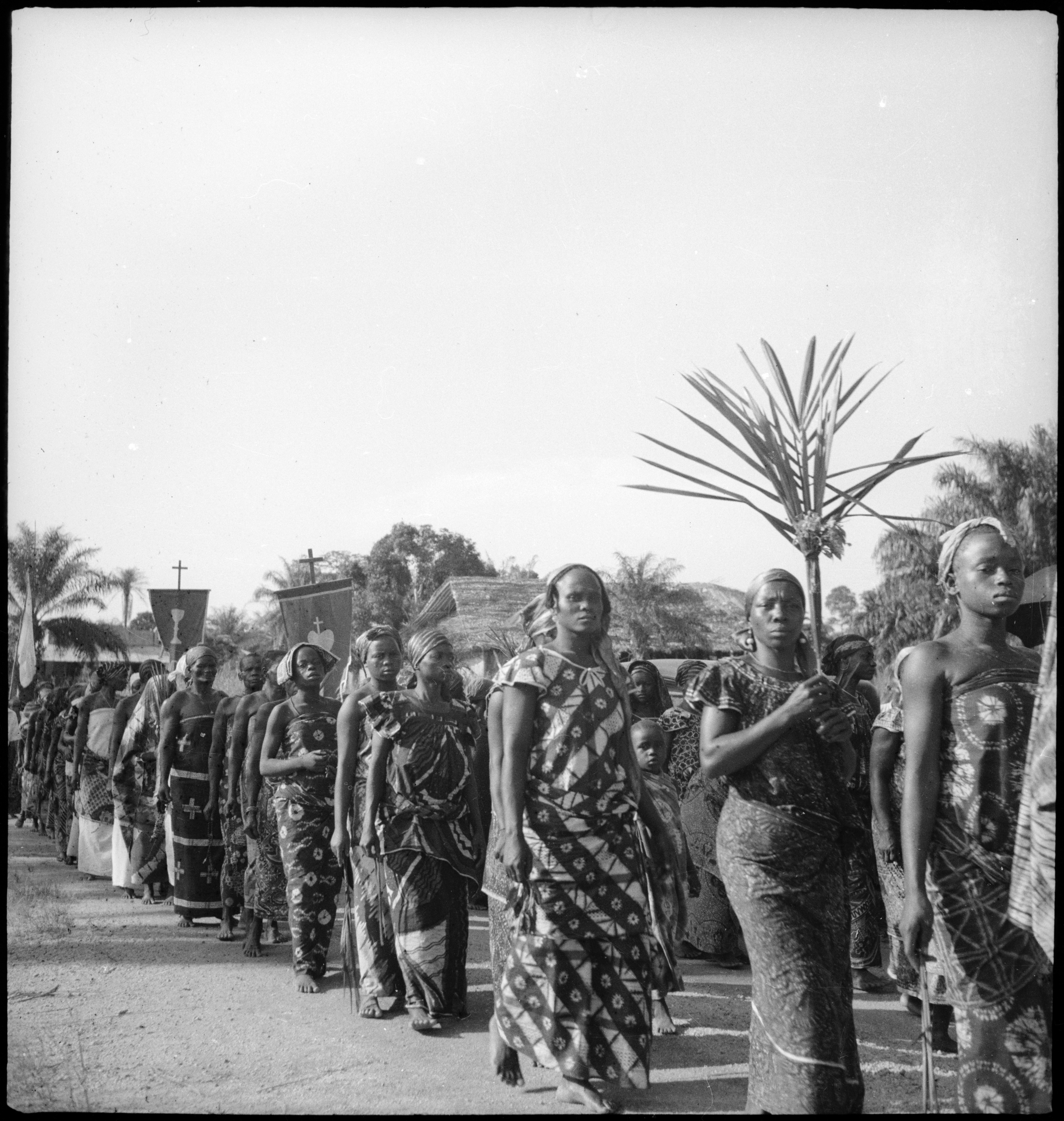 Belgisch-Kongo, Buta: Alltagsszene; Mehrere farbige Frauen und Kinder in einem Prozessionsumzug durch eine Strasse